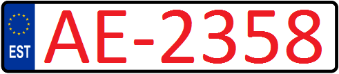 Транзитный номерной знак Эстонии